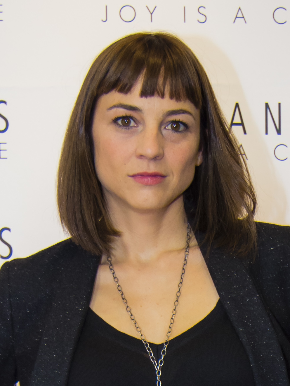 HispanitasLovesMadrid